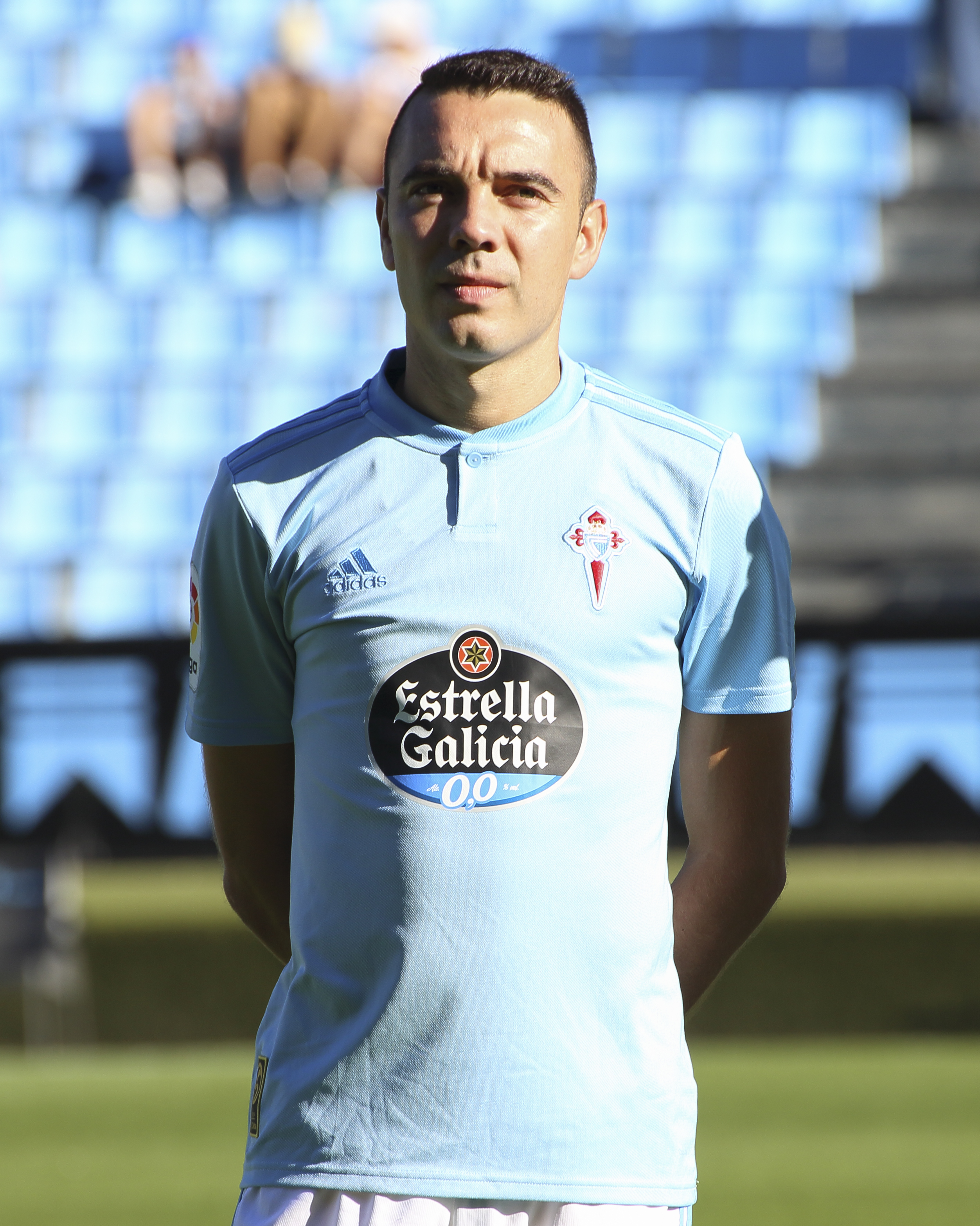 Presentación RC Celta - Temporada 18/19